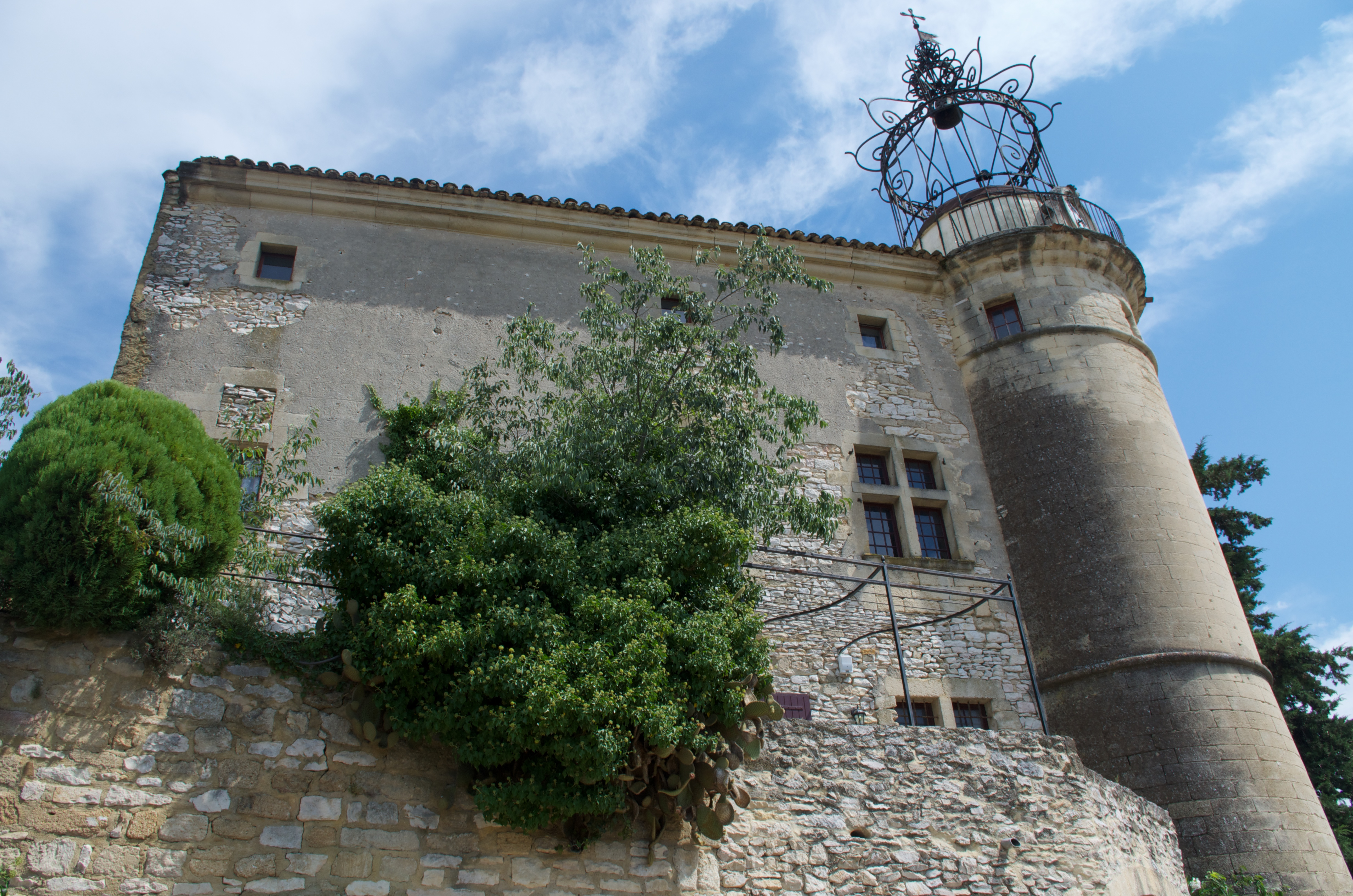 Tour du château de Valliguières